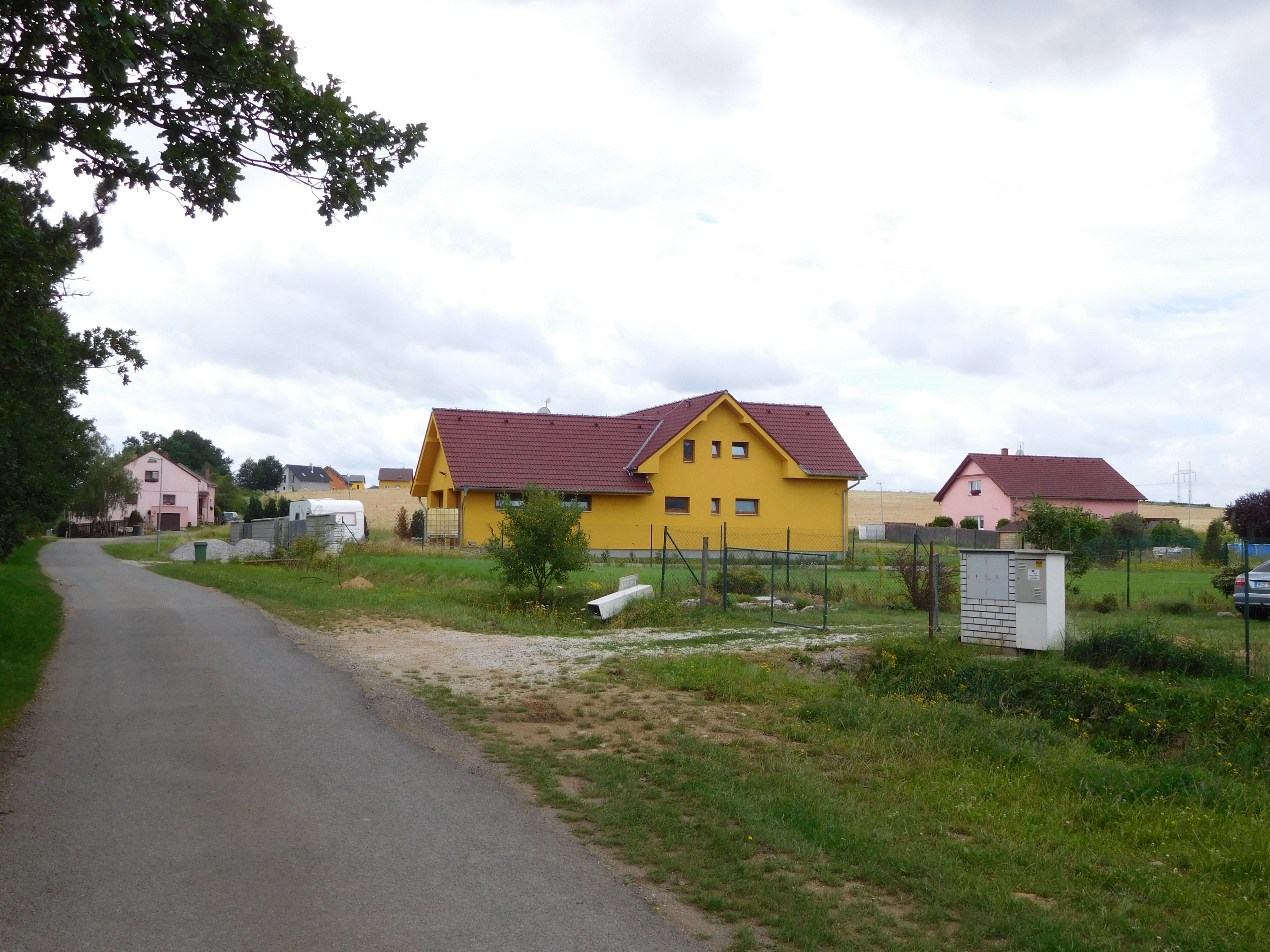 Bavoryně - Na Lhotkách - č.p. 66, 119 a 121